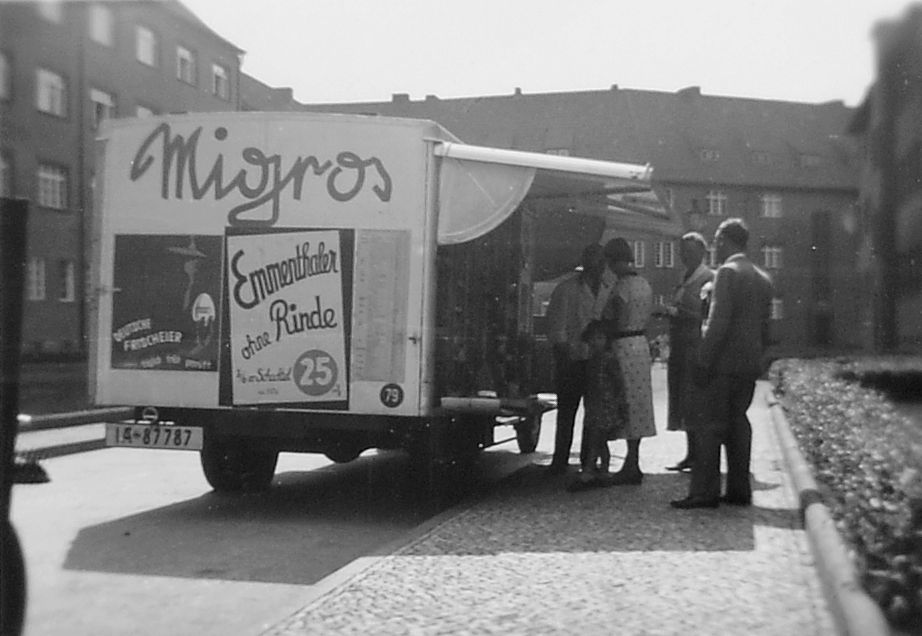 Migros Berlin: Kunden am Verkaufswagen, Werbung "Emmenthaler ohne Rinde", Frischeier